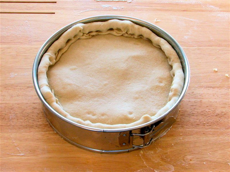 Pizza crimped in a springform panCrimp edges